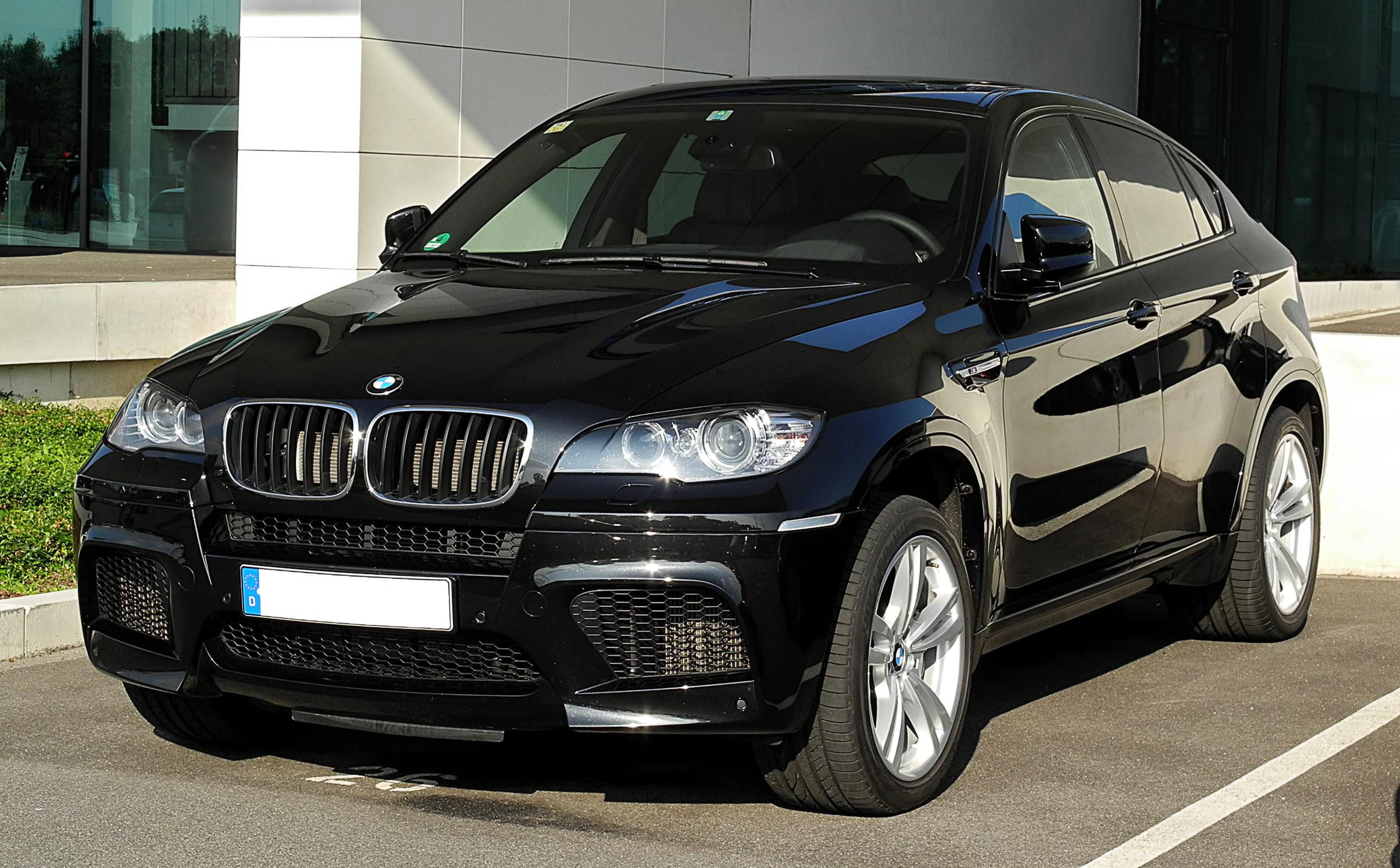 BMW X6 M (E71)